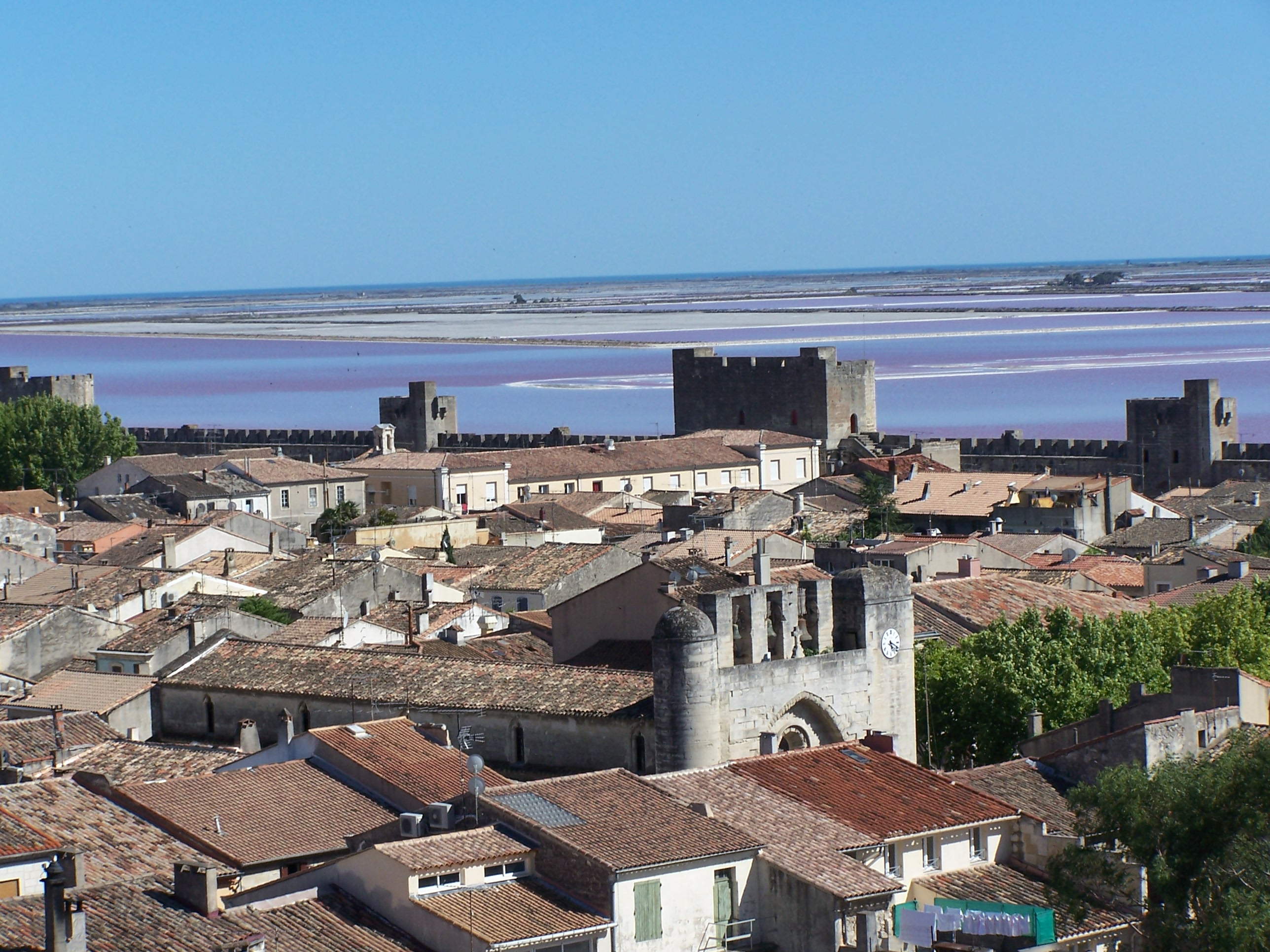 Vue des toits d'Aigues Mortes